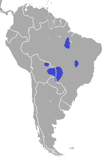 Distribución del Anodorhynchus hyacinthinus